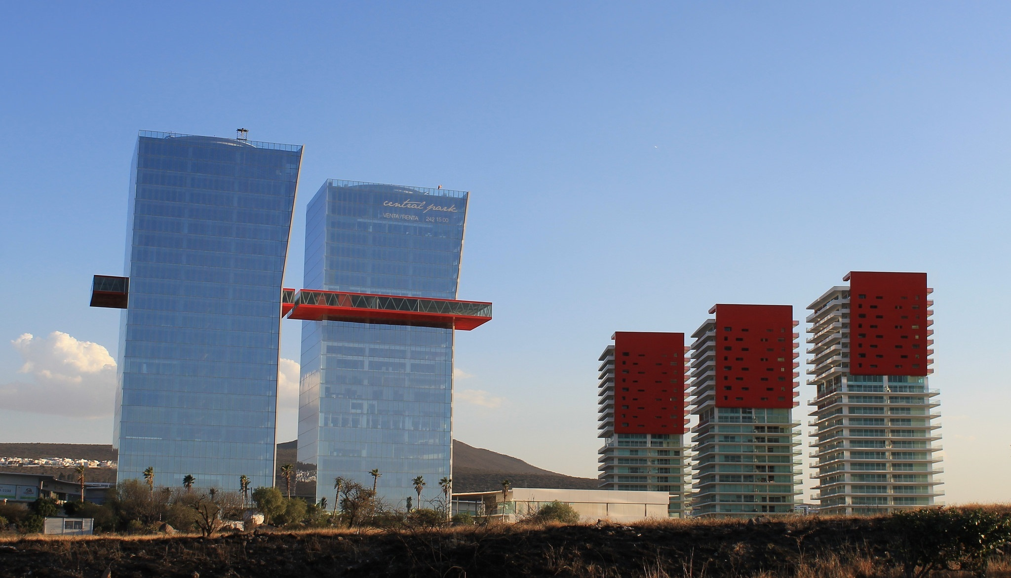 Santiago de Querétaro Centro Financiero